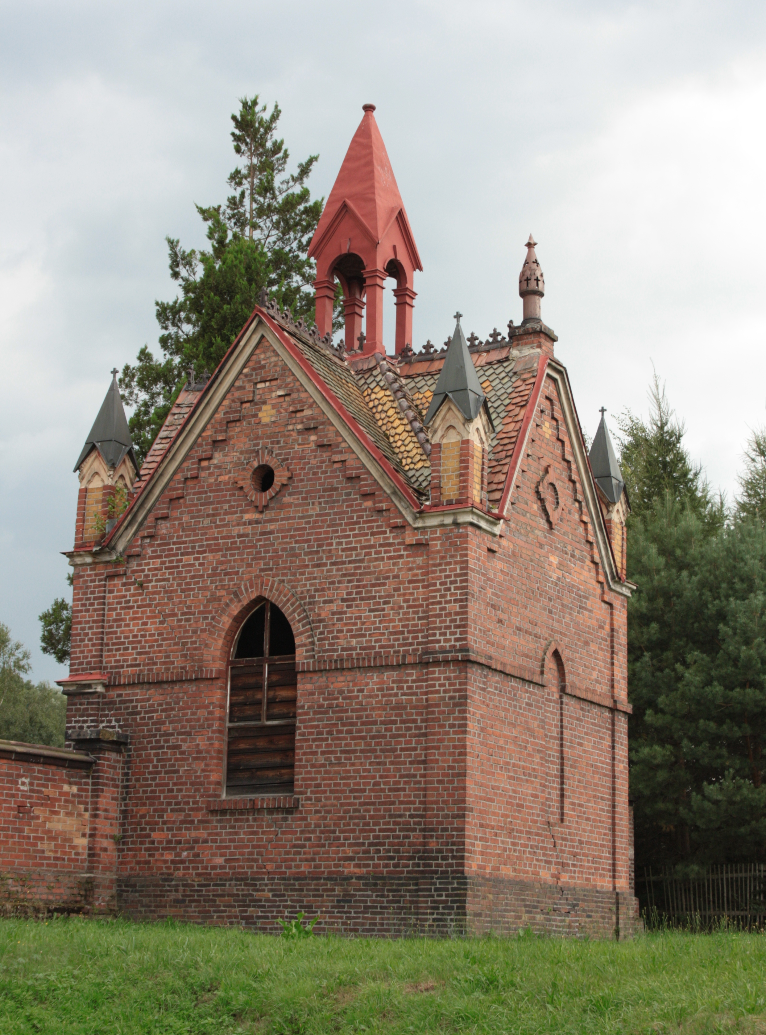 Kaple na hřbitově u kostela v Kunraticích poblíž Frýdlantu v okrese Liberec.